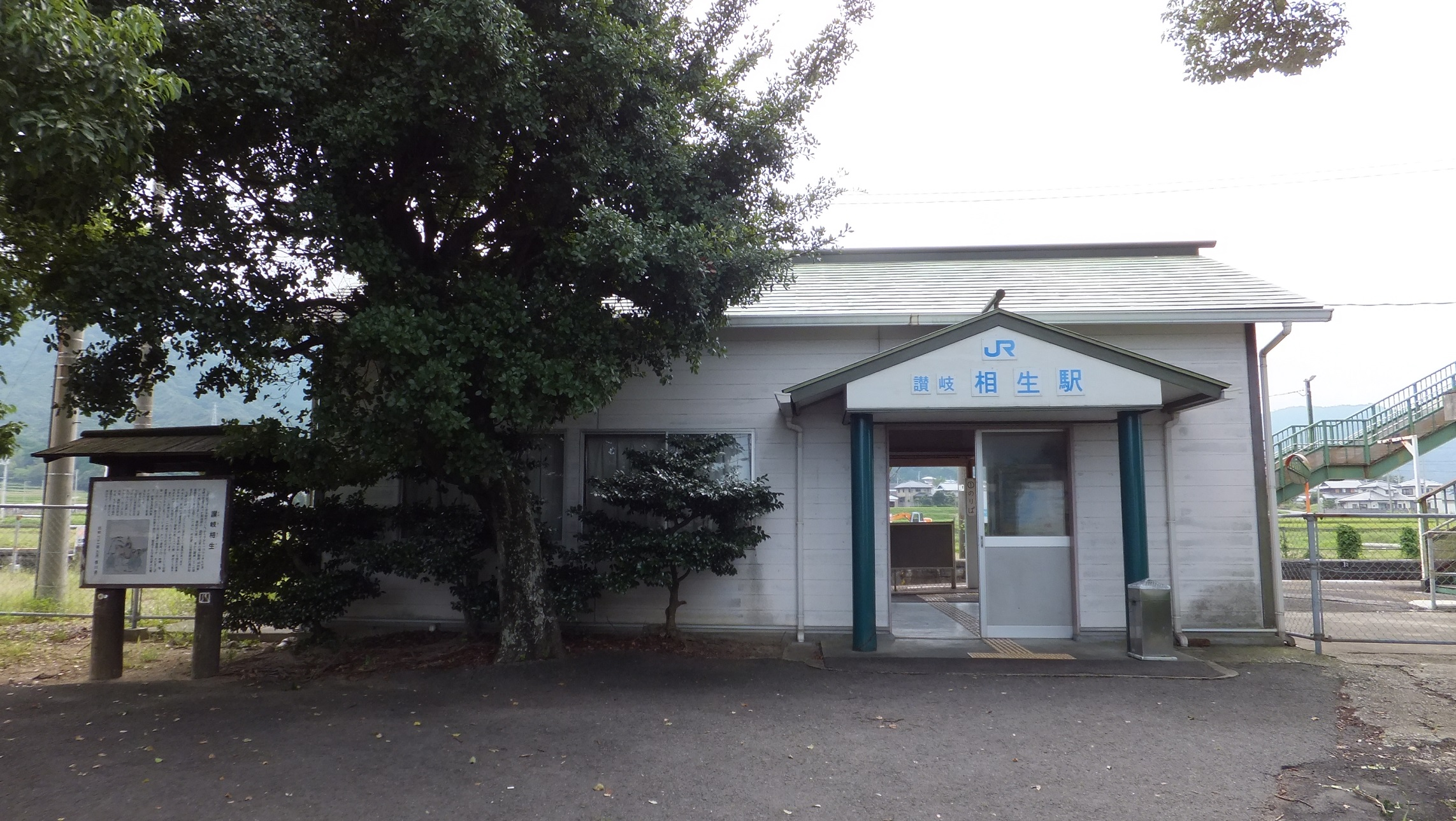 JR高徳線 讃岐相生駅（2015年） 香川県東かがわ市